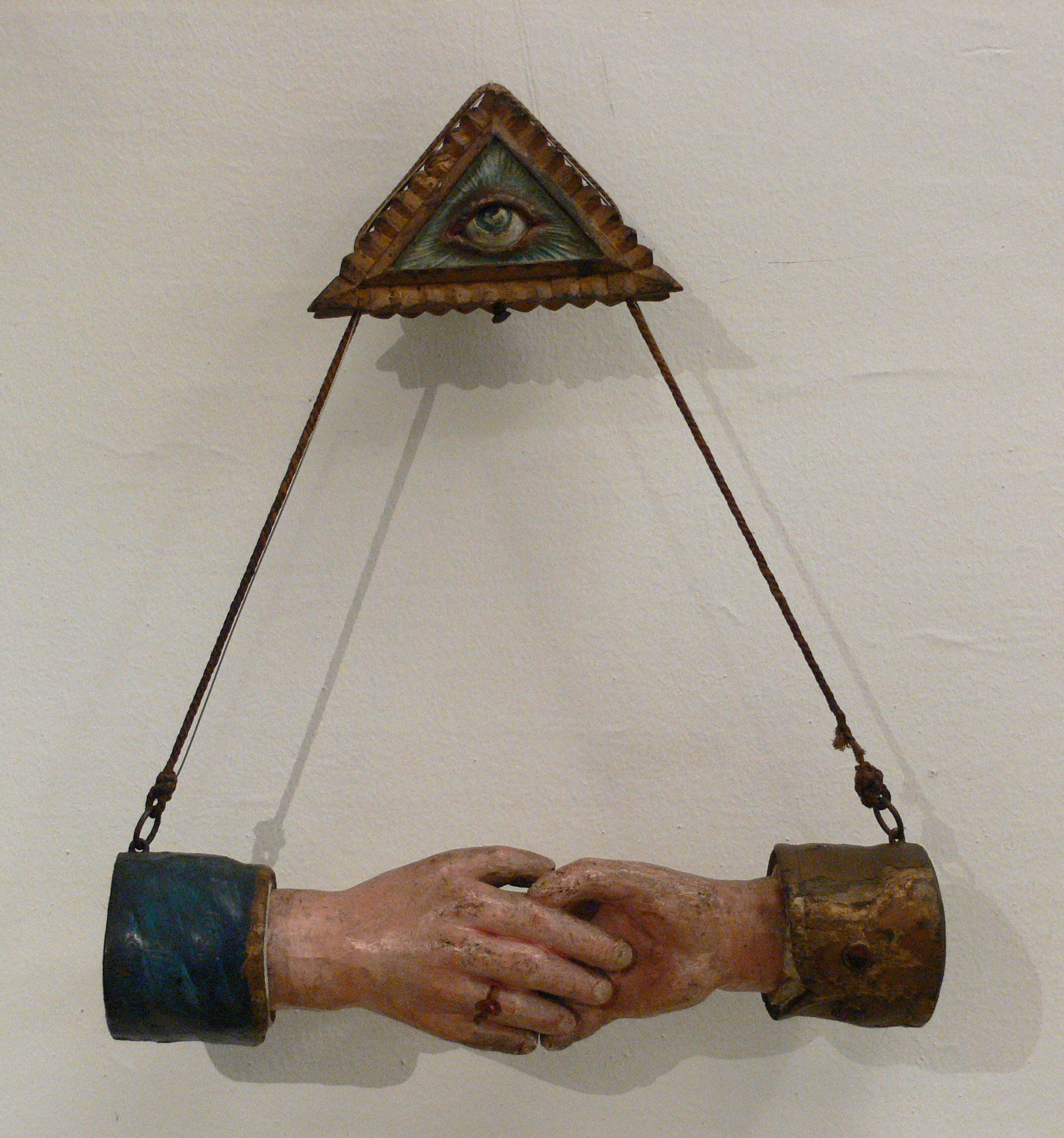 Vebrüderungshände mit Auge Gottes, Weichholz geschnitzt und gefasst, Steyr (Oberösterreich) um 1800 Wien, Österreichisches Museum für Volkskunde; ÖMV-Inv.nr. 40.108